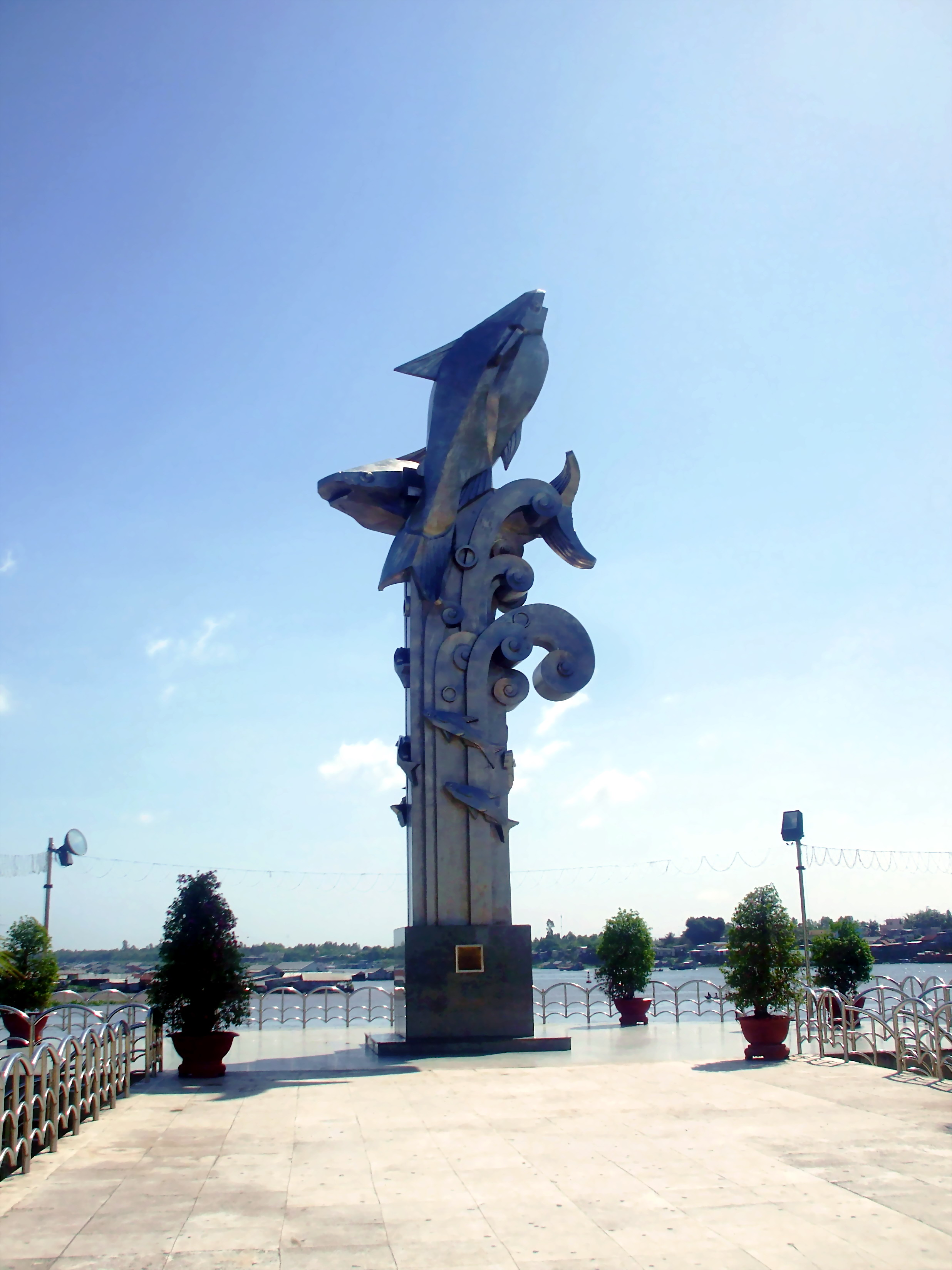 Tượng đài cá Basa (Pangasius bocourti) tại công viên ngã ba sông ở Châu Đốc, tỉnh An Giang.